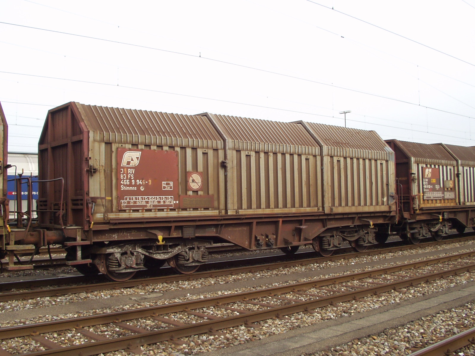 Flachwagen Sonderbauart mit Dach für den Transport von Coils. Aufgenommen am 09.09.2005 im RB Limmattal durch S.Hinni (eigenes Bild)